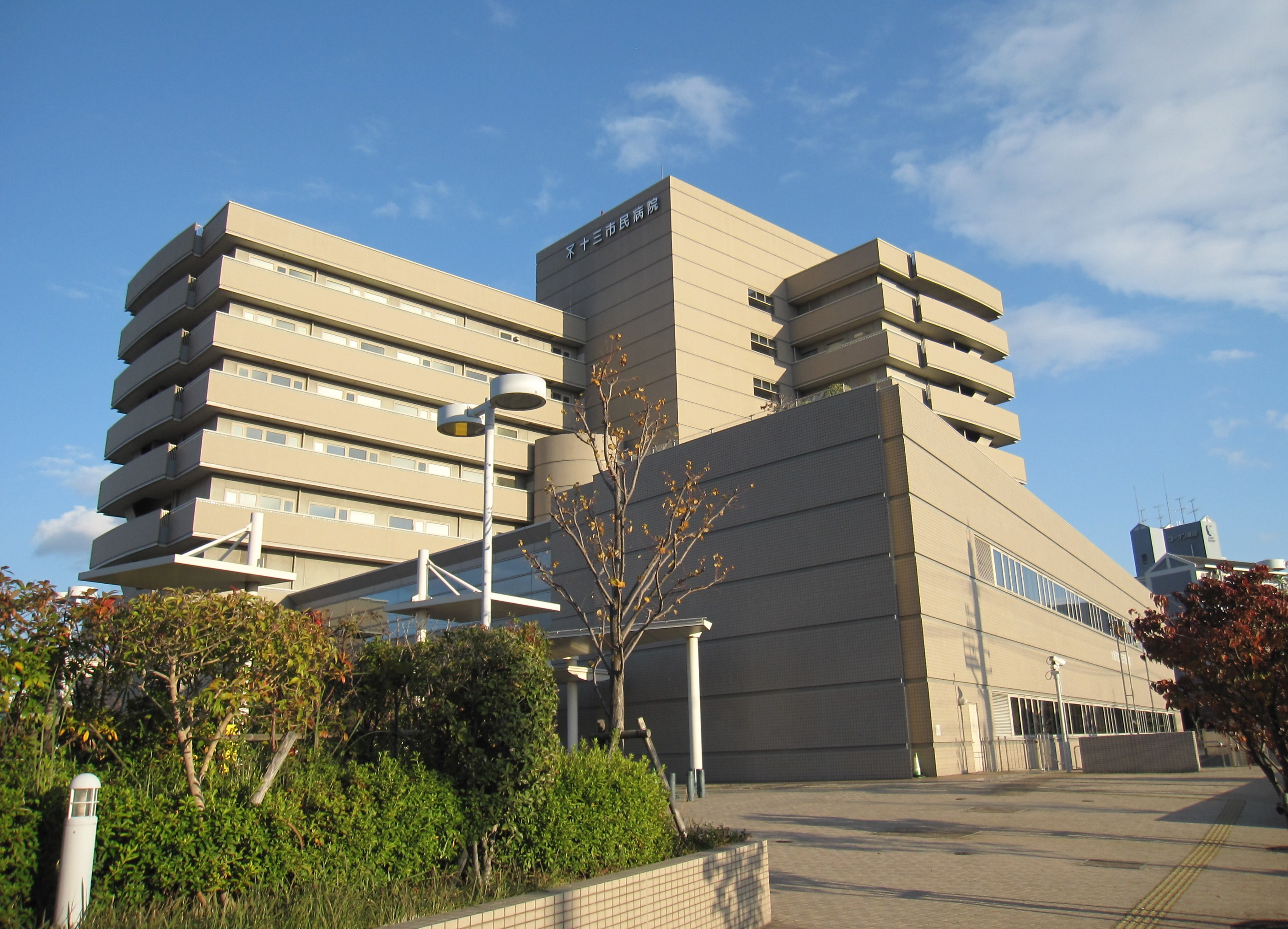 大阪市立十三市民病院